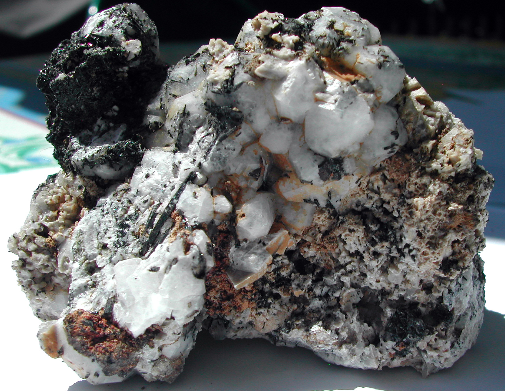 Analcite (Analcime) from Poudrette quarry, Mont-Saint-Hilaire